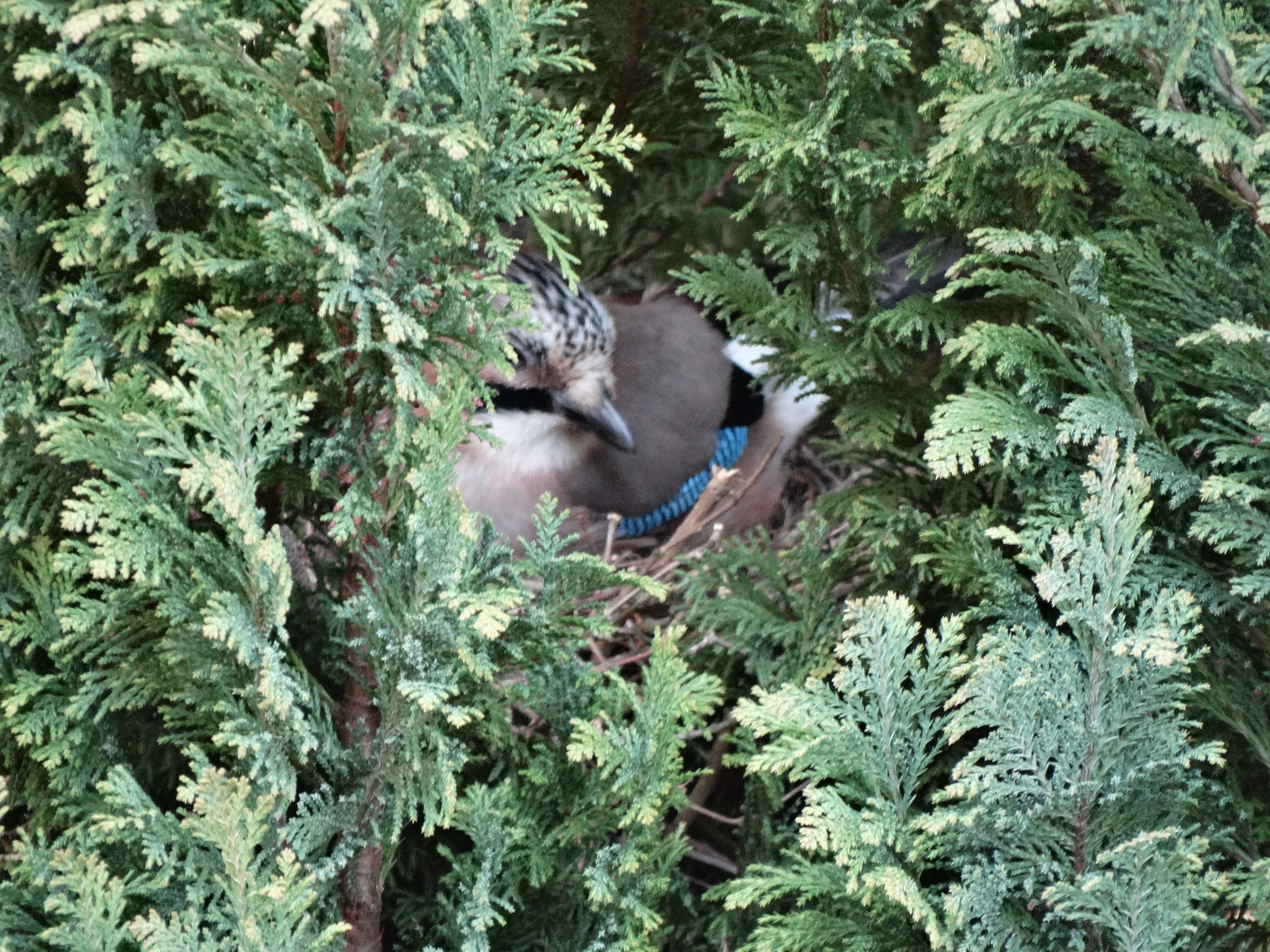 Brütender Eichelhäher, 23. April 2015 in Hochfranken (Bayern) im Wipfel eines Wacholderbaums (Juniperus) auf einer Höhe von etwa 7-8 Metern.